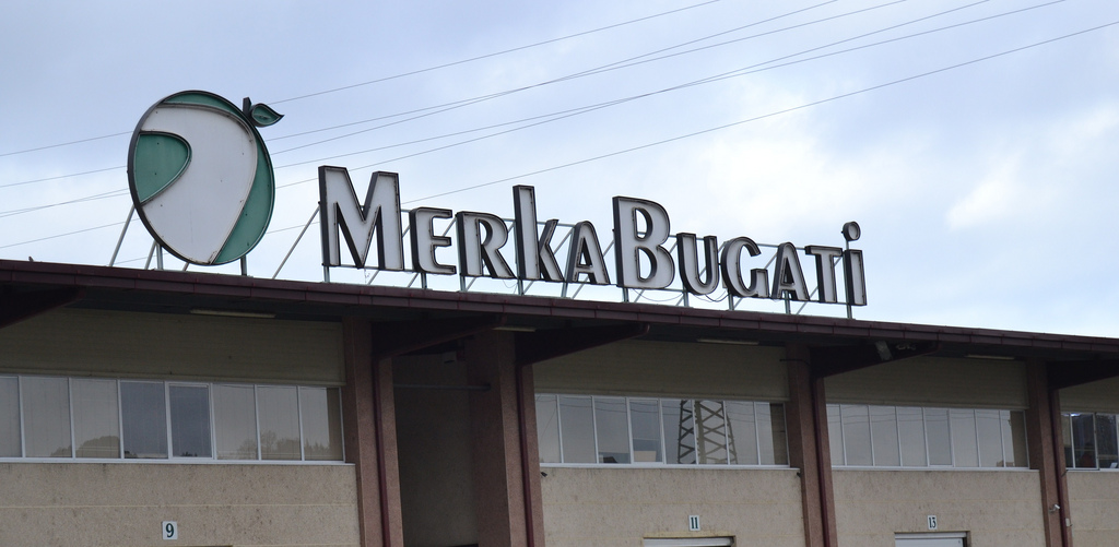 MERKABUGATI es un mercado mayorista de fruta y verdura situado en la capital de la provincia guipuzcoana. Un nombre tan peculiar que obtuvo en 1998 con el traslado a las nuevas instalaciones, de 44.000 metros cuadrados, el antiguo Mercado Central de Frutas de Atocha, fundado en 1945. Con aparcamiento para más de 500 vehículos y muelles de carga y descarga, MERKABUGATI está considerado uno de los mercados más modernos de Europa, hoy en día. Más de 20 mayoristas trabajan ofreciendo en MERKABUGATI sus frutas y hortalizas, dando comienzo así a la cadena que conecta al consumidor con el agricultor.